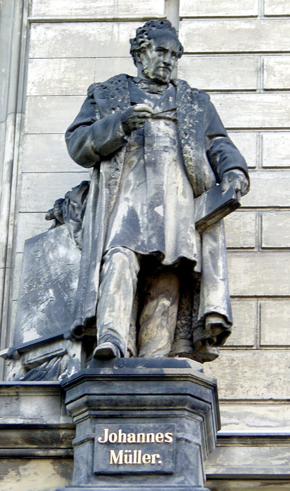 Statue des Johannes Peter Müller über dem Eingang des Naturkundemuseum, Berlin.